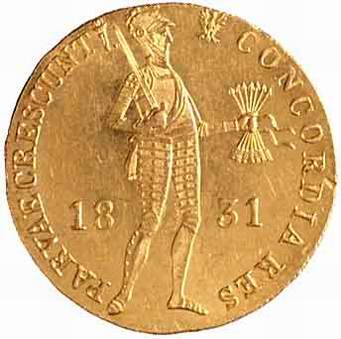 Dukat powstańczy 1831. Odmiana z kropką za pochodnią. Awers. autor: mzopw